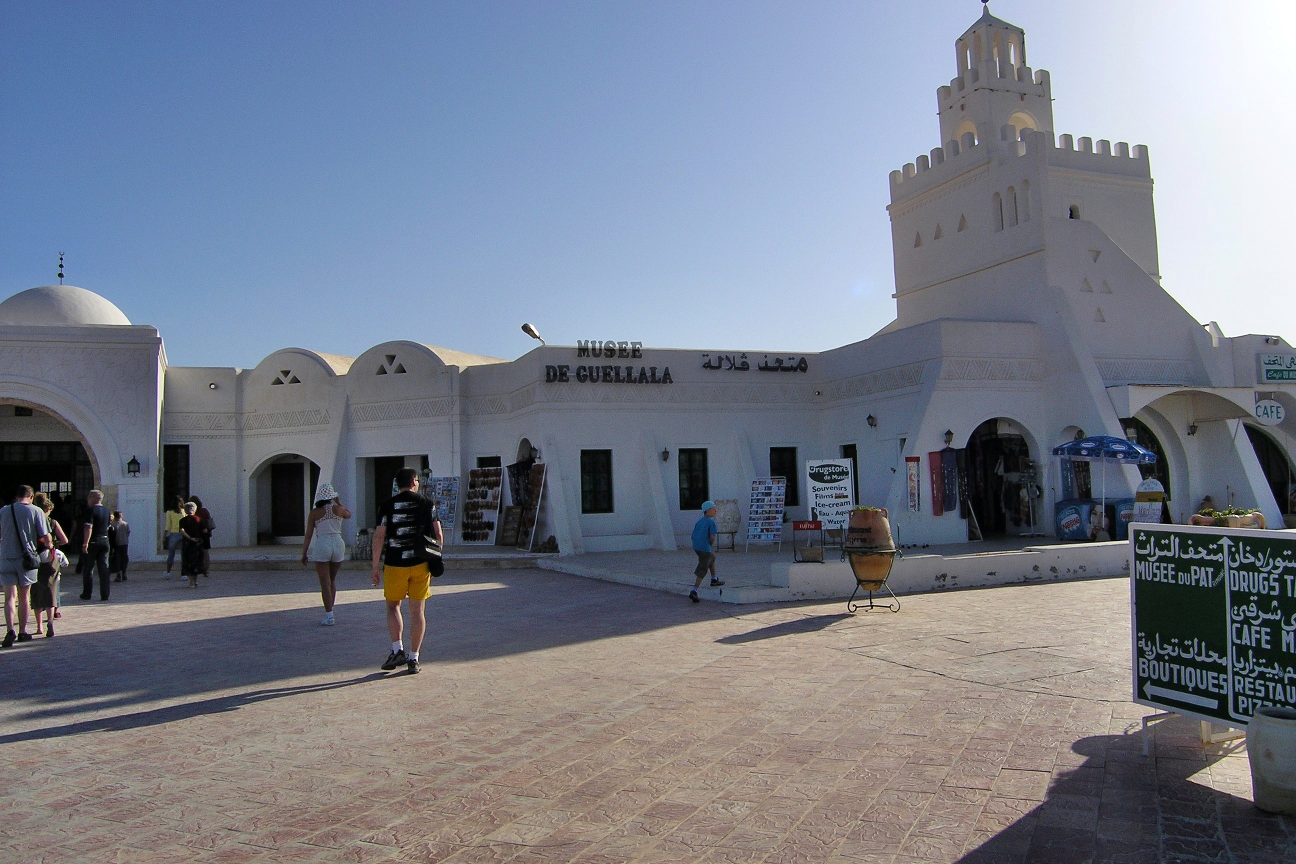 tunus cerbe adası ve fransız sitili kapalı pazarları by ismail soytekinoğlu